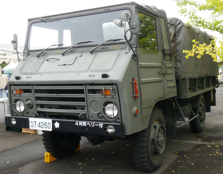 73式中型トラック（旧型）。